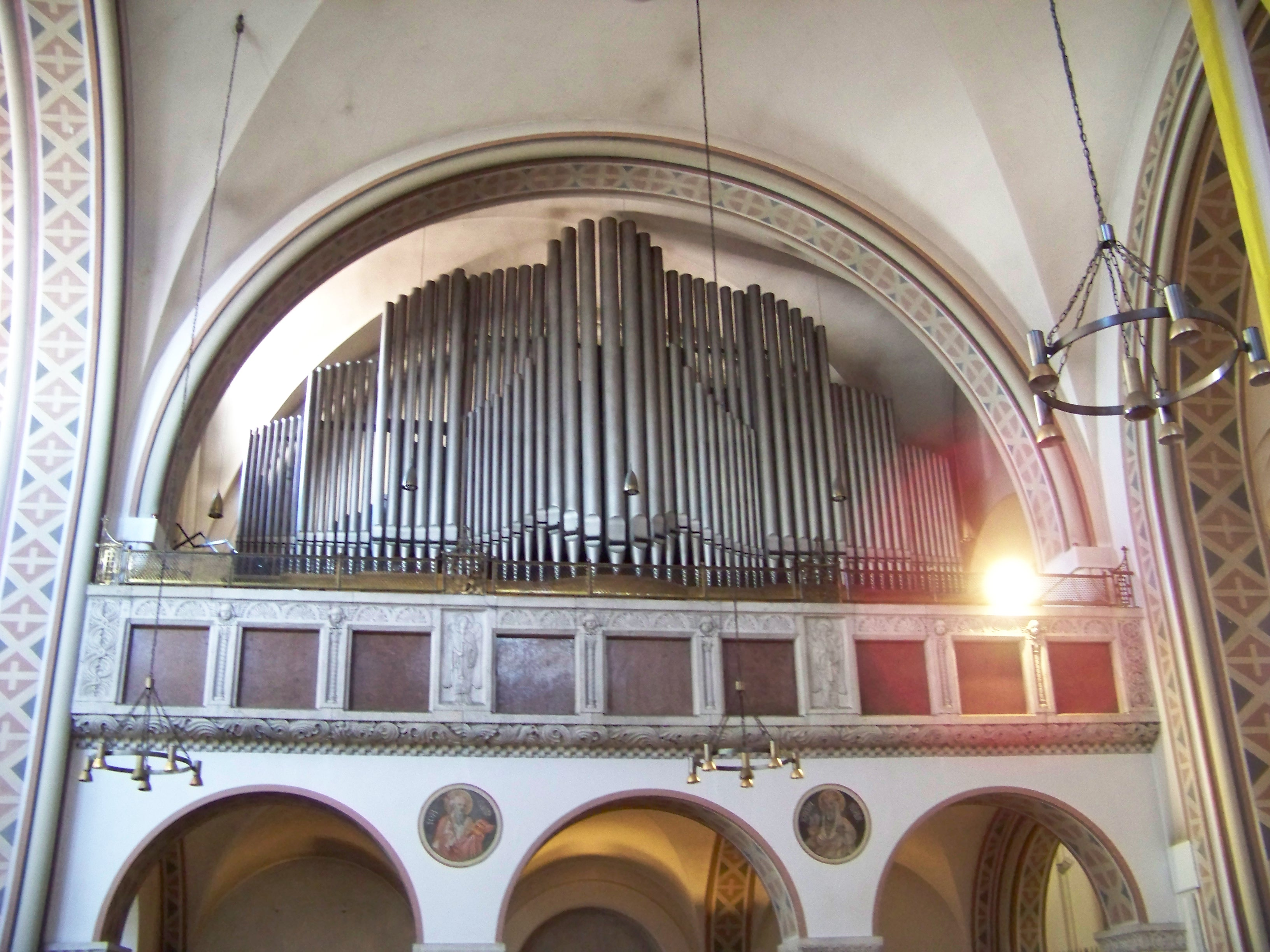 Regensburg Reichstraße 12 Kirche St. Cäcilia. Die derzeitige Orgel stammt von der Orgelbaufirma Michael Weise aus dem Jahr 1939. Sie hat 41 klingende Register, verteilt auf drei Manualen und Pedal. Die Trakturen sind elektrisch. Dadurch war es möglich, einen zweiten identischen Spieltisch im Chorraum zu platzieren, um einen besseren Kontakt zur Choralschola zu ermöglichen. Der Prospekt, entworfen von Michael Weise und dem Kirchenmaler Georg Winkler wurde als ein dominierender Freipfeifenprospekt ausgeführt, der die gesamte Rundung des Querhauses einnimmt.